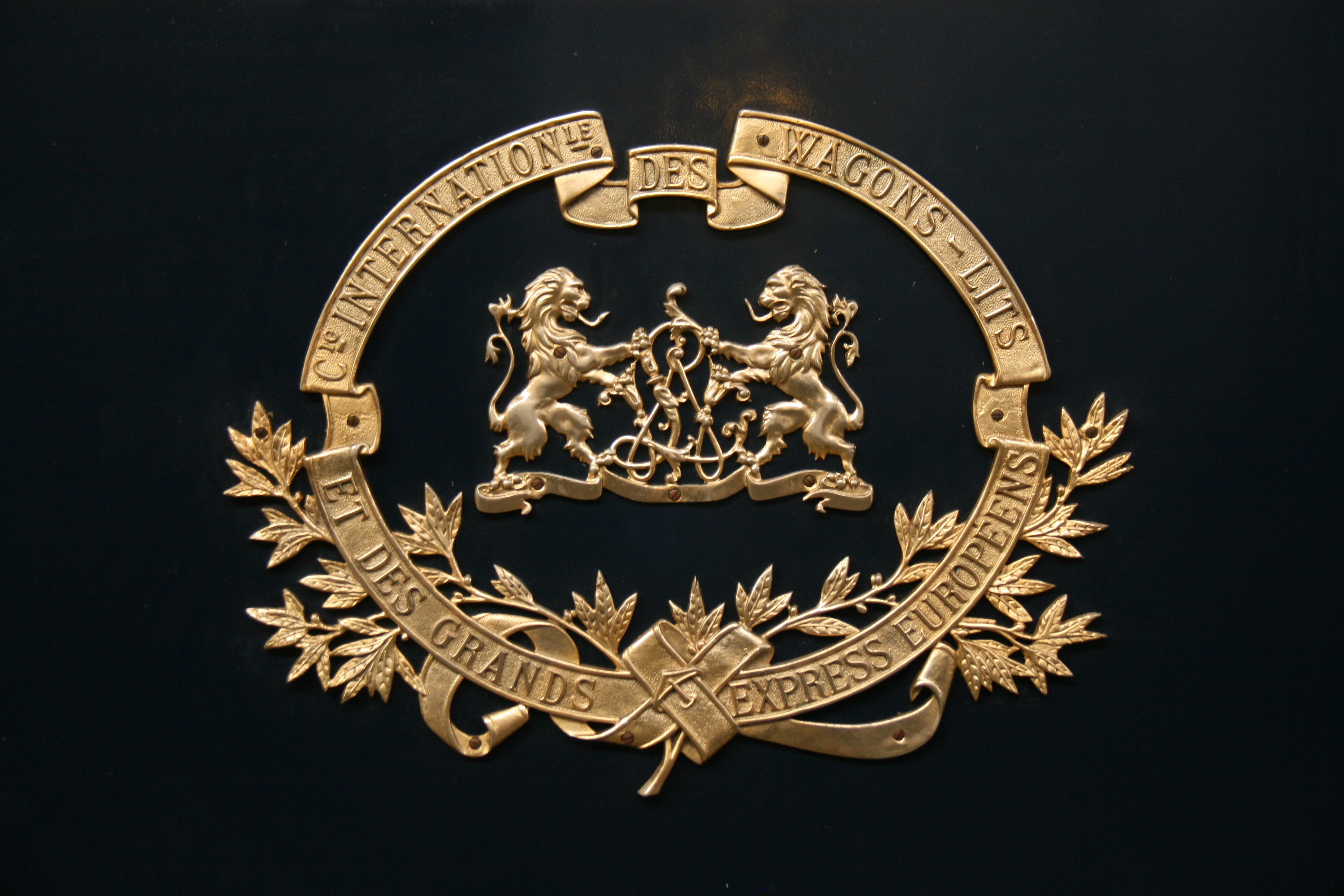 Logotipo de wagons-Lit